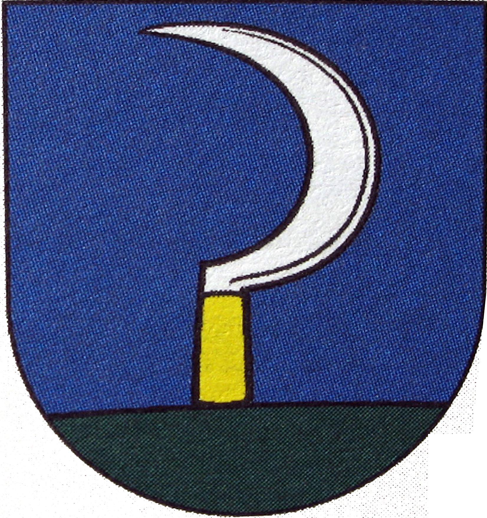 Rakovčík erb obce: V modrom štíte na zelenej pažiti je strieborný kosák so zlatou rukoväťou.